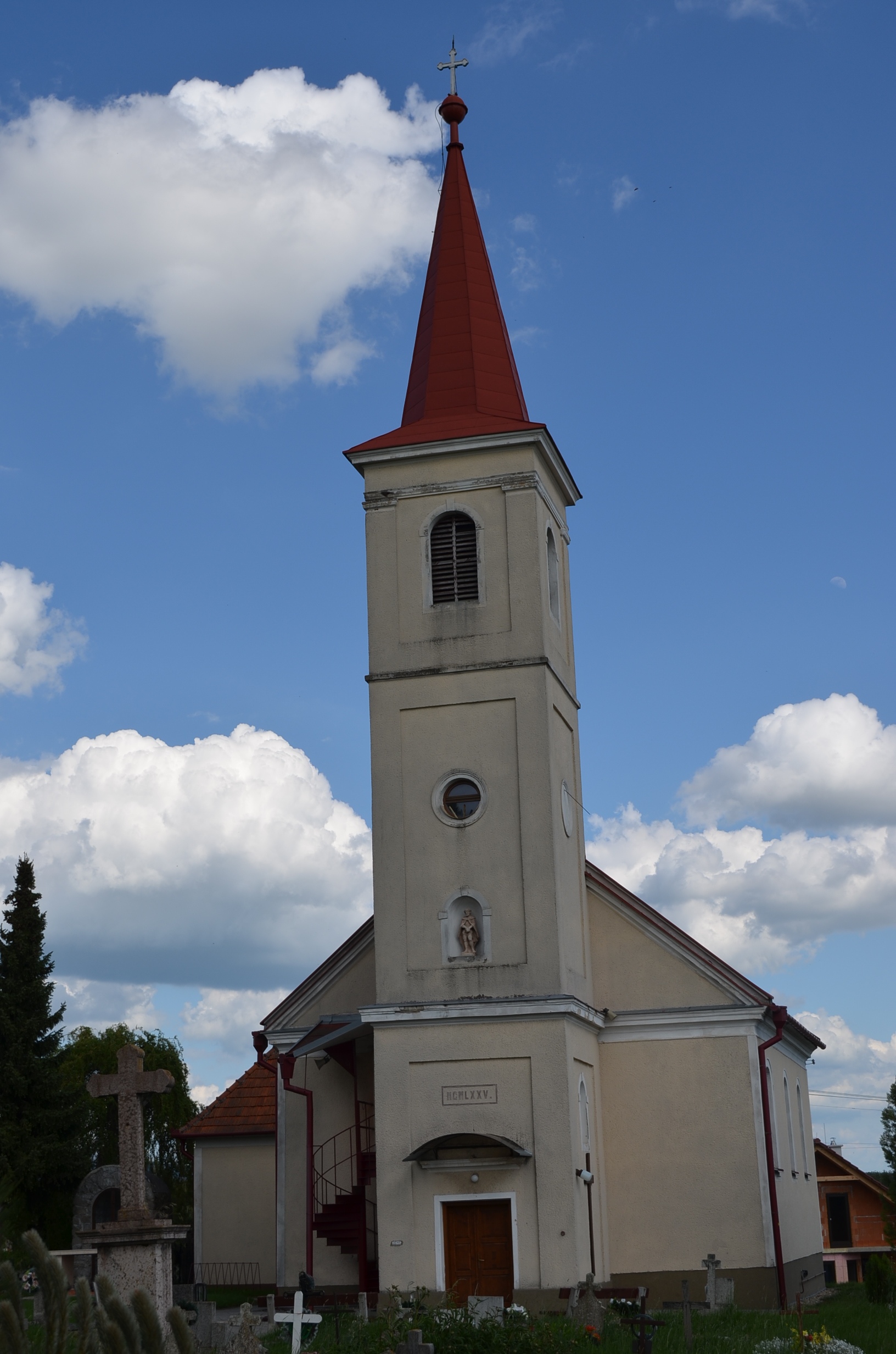 Néver